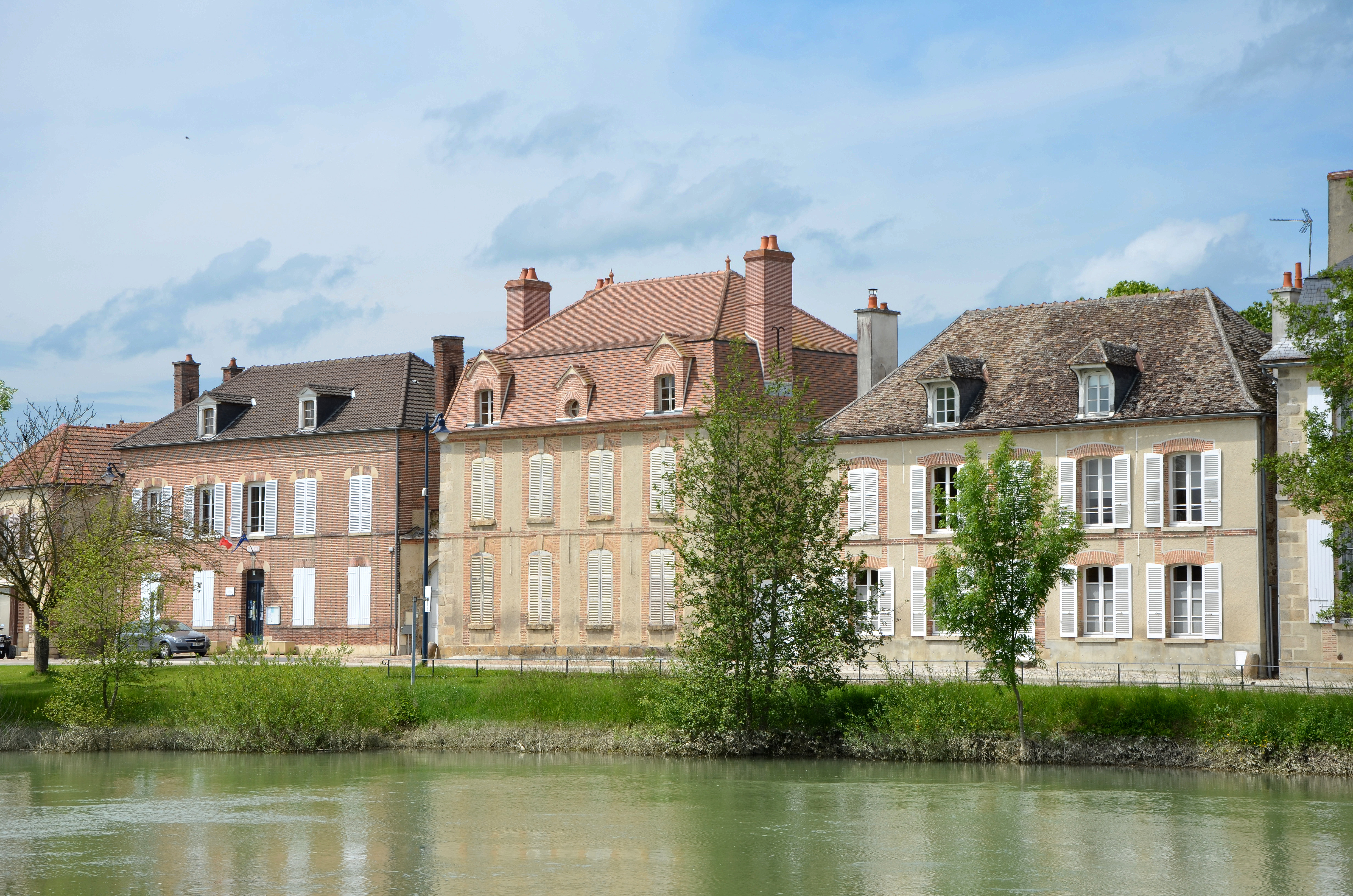 Maisons en bord de Seine, Marcilly sur Seine, Marne, France